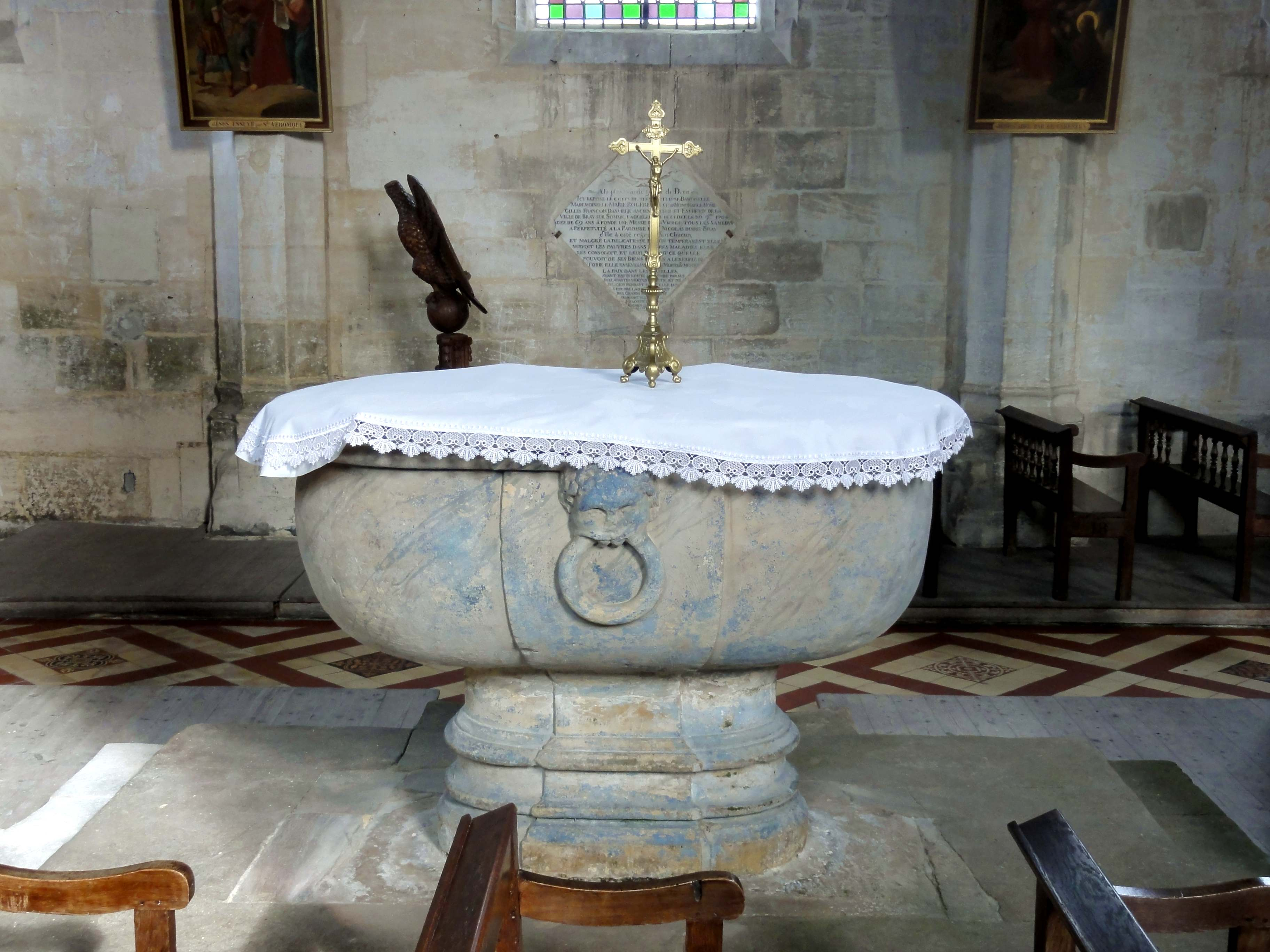 Les fonts baptismaux du XVIe siècle.